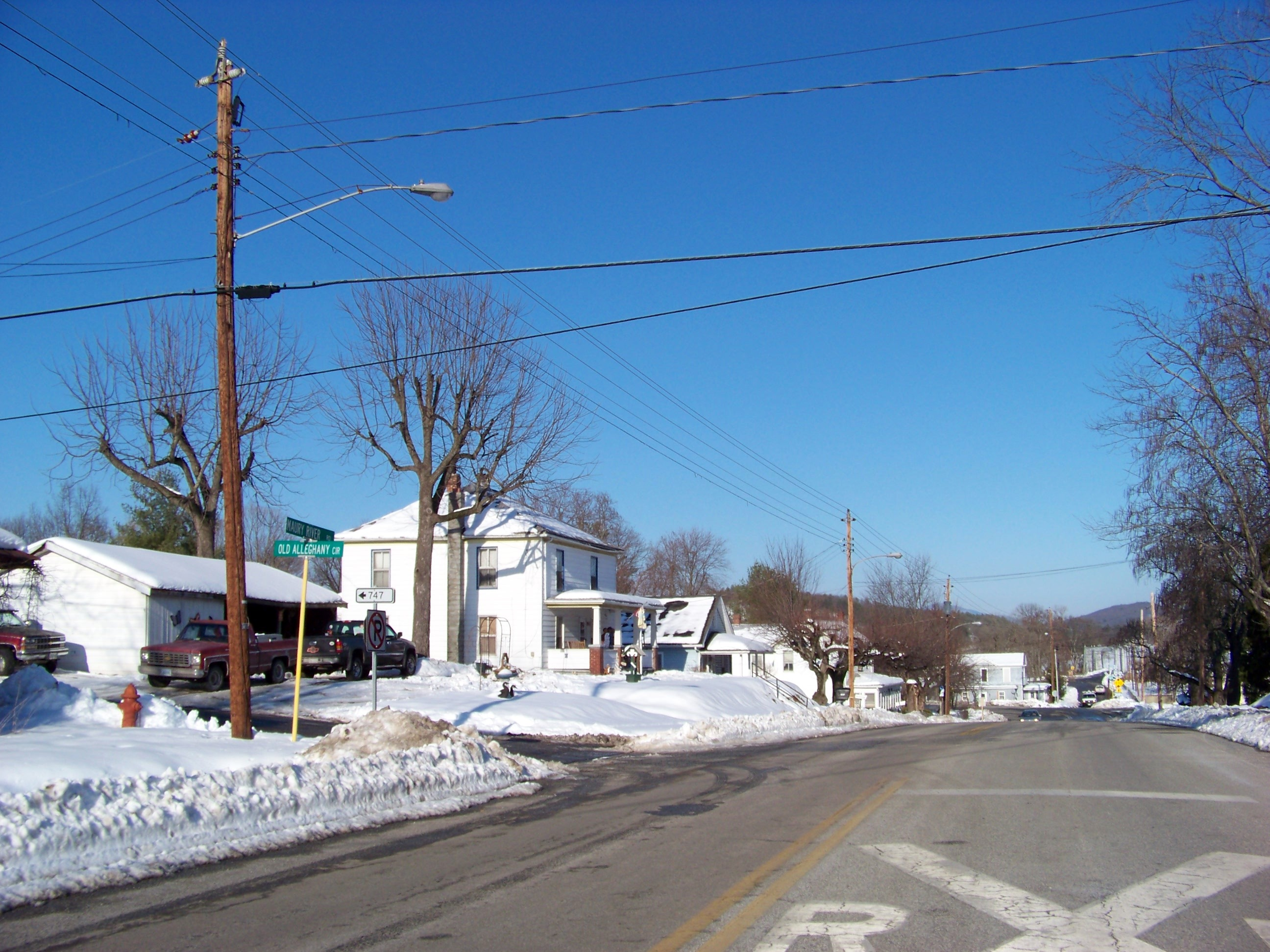 Goshen, Virginia